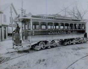 Boston, Massachusetts